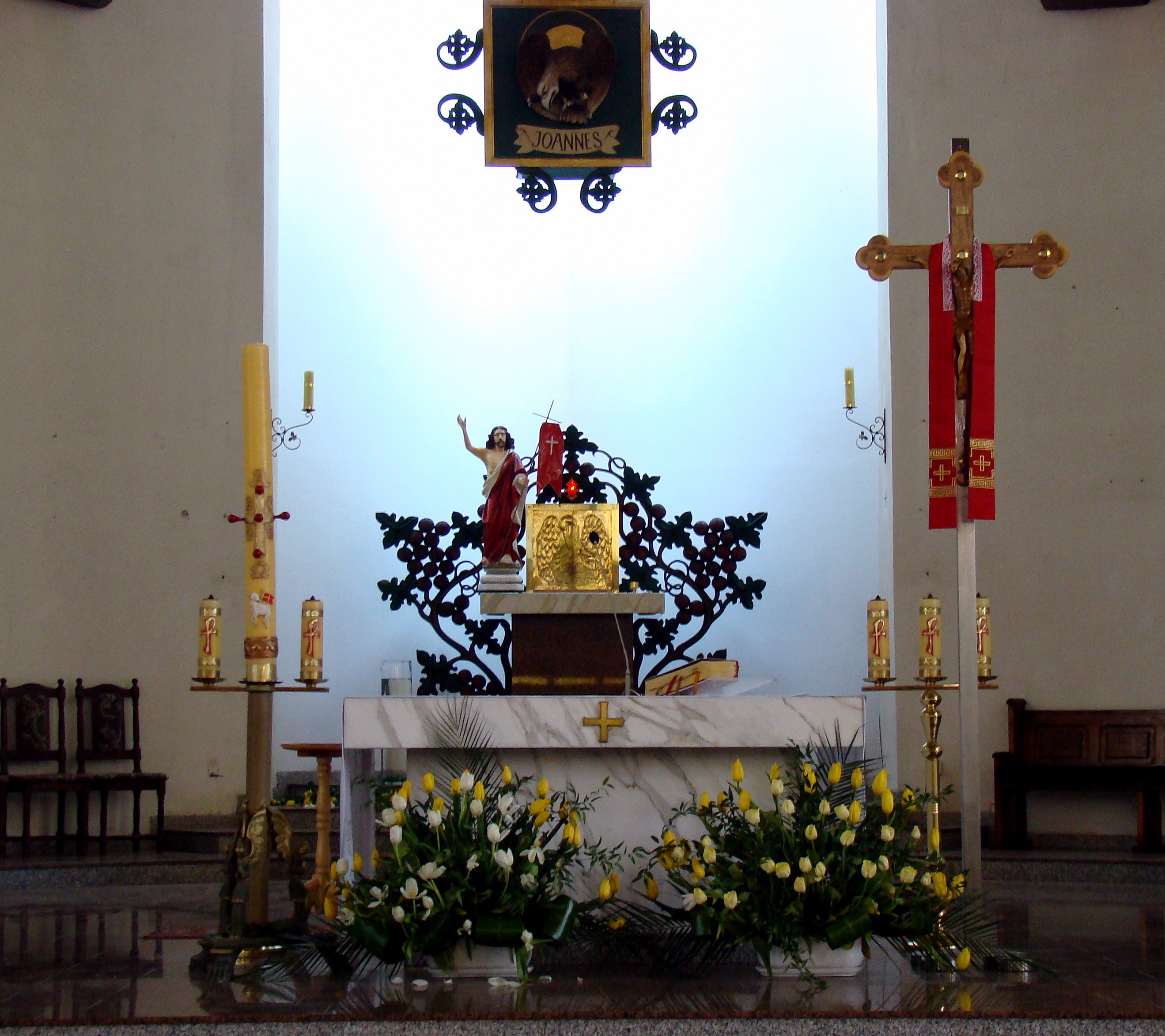 Kościół pw. św Kazimierza Królewicza w Policach (prezbiterium), Polska